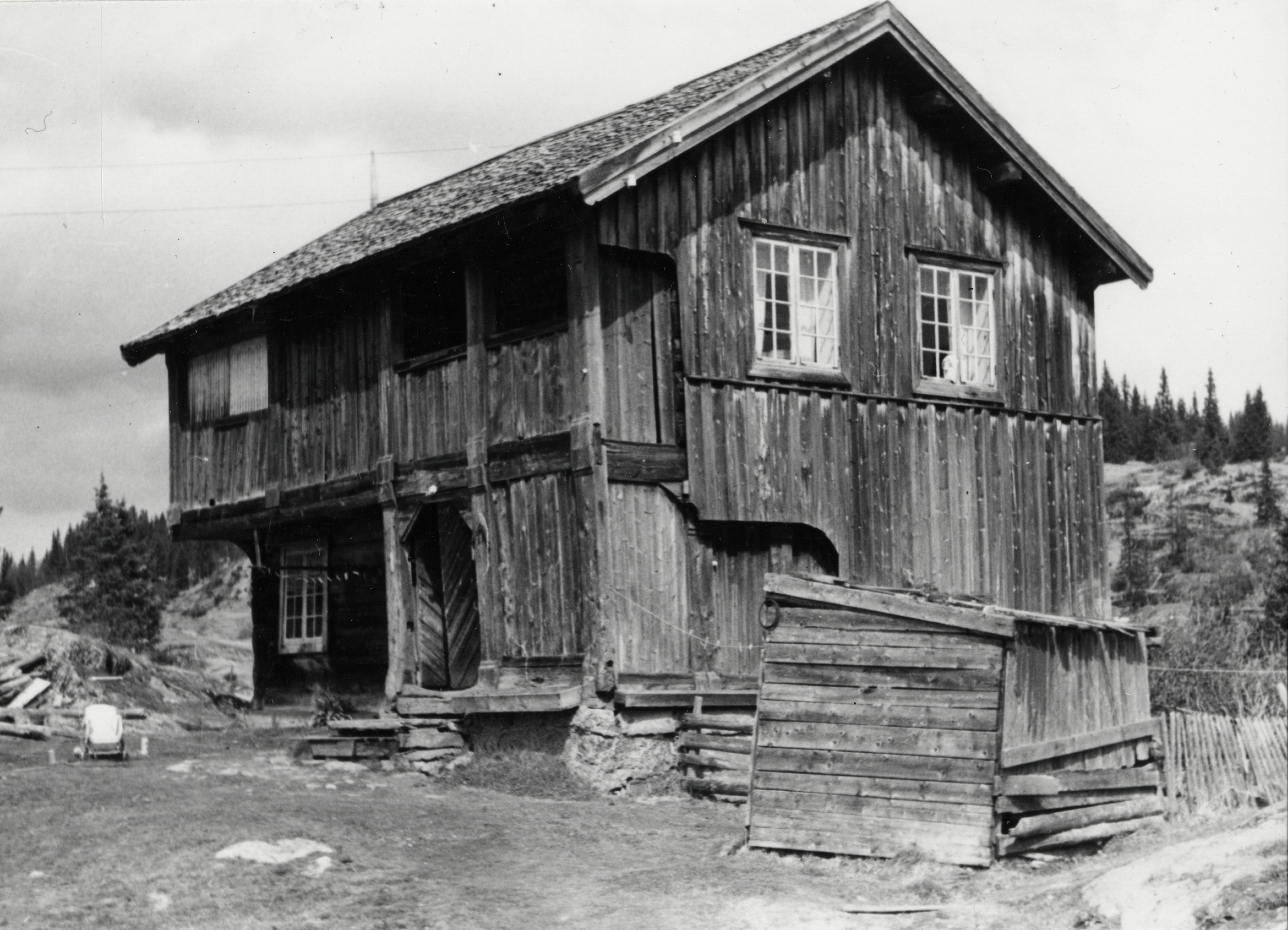 Tveiten, Lårdal bygdetun i Eidsborg, Telemark